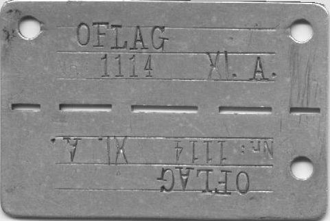 Nieśmiertelnik 1114 Osterode